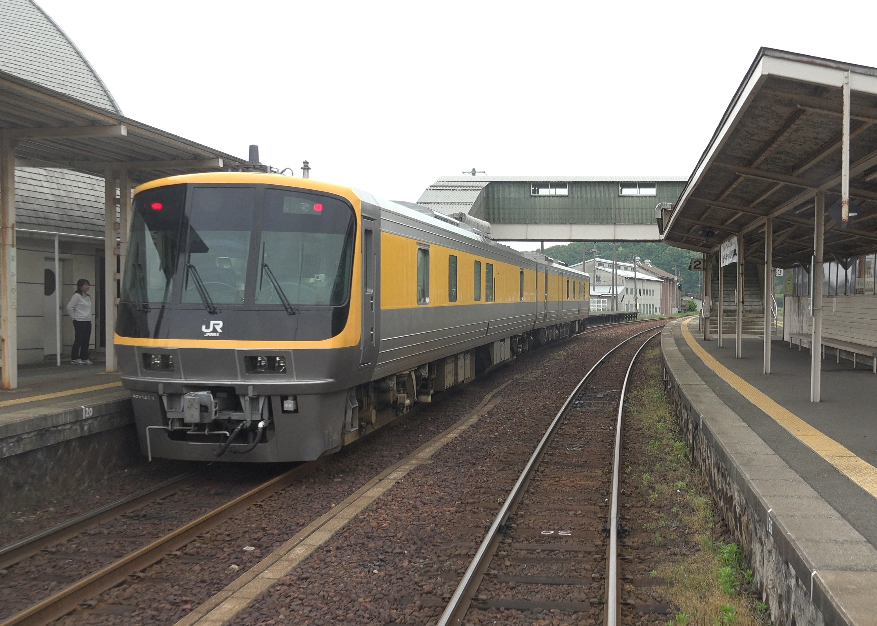 北近畿タンゴ鉄道（KTR）網野駅を発車する、JR西日本「キヤ141系」 （「丹後あかまつ1号」(702)から） 2014年5月14日12:11 （SONY FDR-AX100 （動画から切り出し））